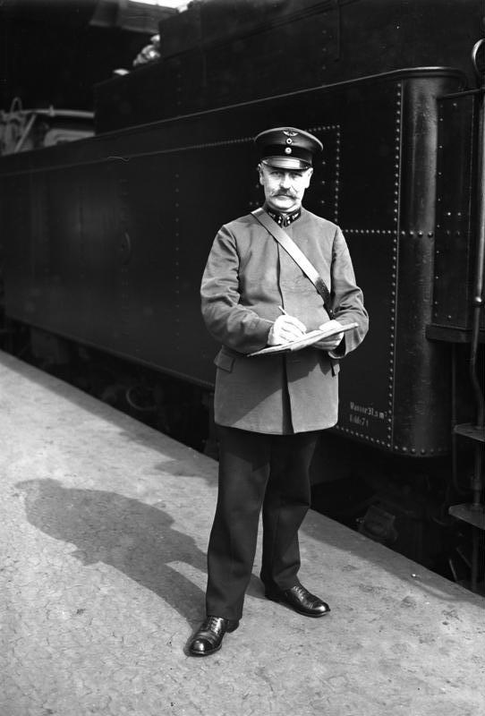 Zugführer der Deutschen Reichsbahn. Der Zugführer hat vor Abfahrt des Zuges die Wagen seines Zuges aufzuschreiben, die Bremsprozente auszurechen und sie dem Lokführer mitzuteilen. Während der Fahrt ist er der maßgebende für den Zug verantwortliche Beamte.